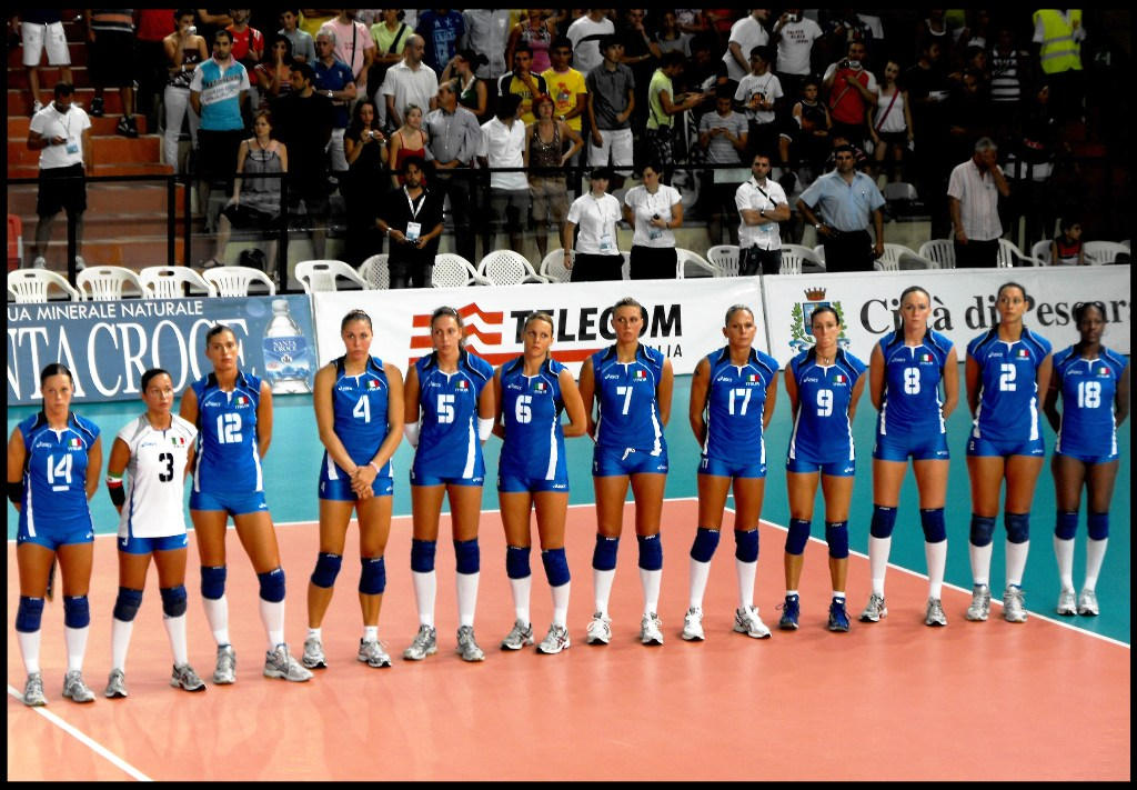 Nazionale di pallavolo femminile dell'Italia ai XVI Giochi del Mediterraneo